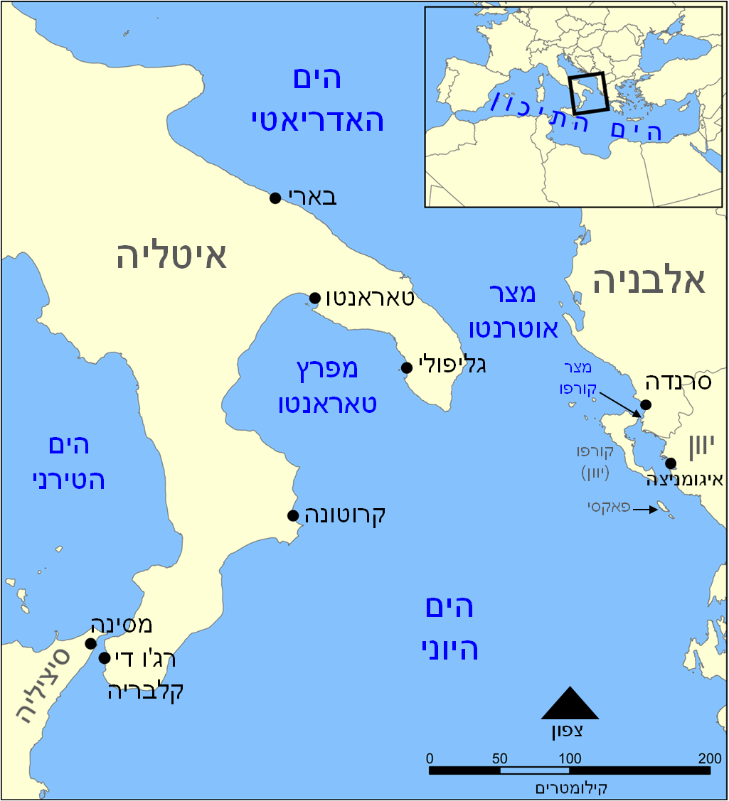 תרגום המפה לעברית.